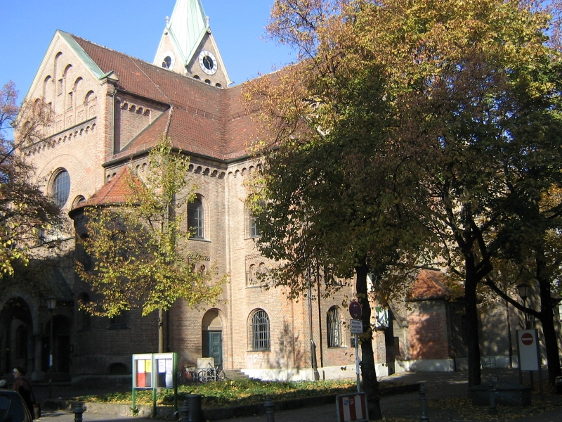 Aufnahme der St. Johanneskirche am Preysingplatz in München (D), von Südosten